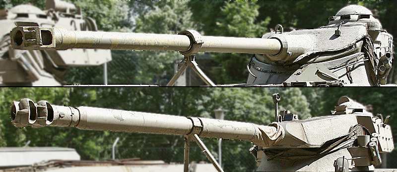 Rohrschutzhülle